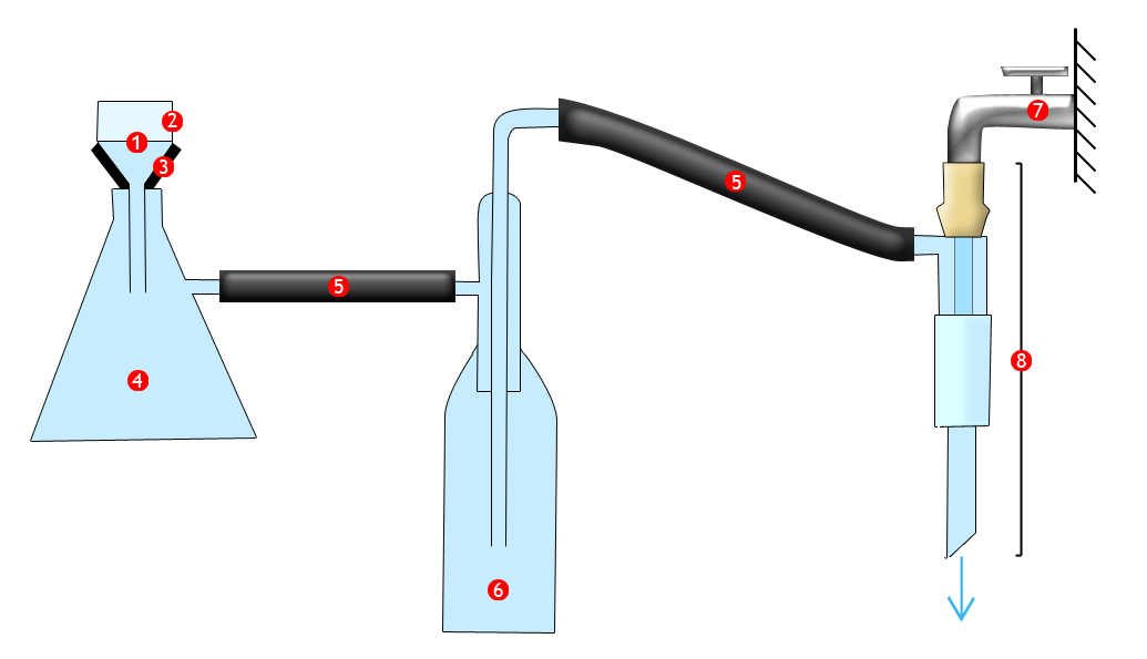 Schéma d'un montage de filtration sous vide, aussi appelée filtration büchner. Ce montage est utilisé pour récupérer un solide rapidement.